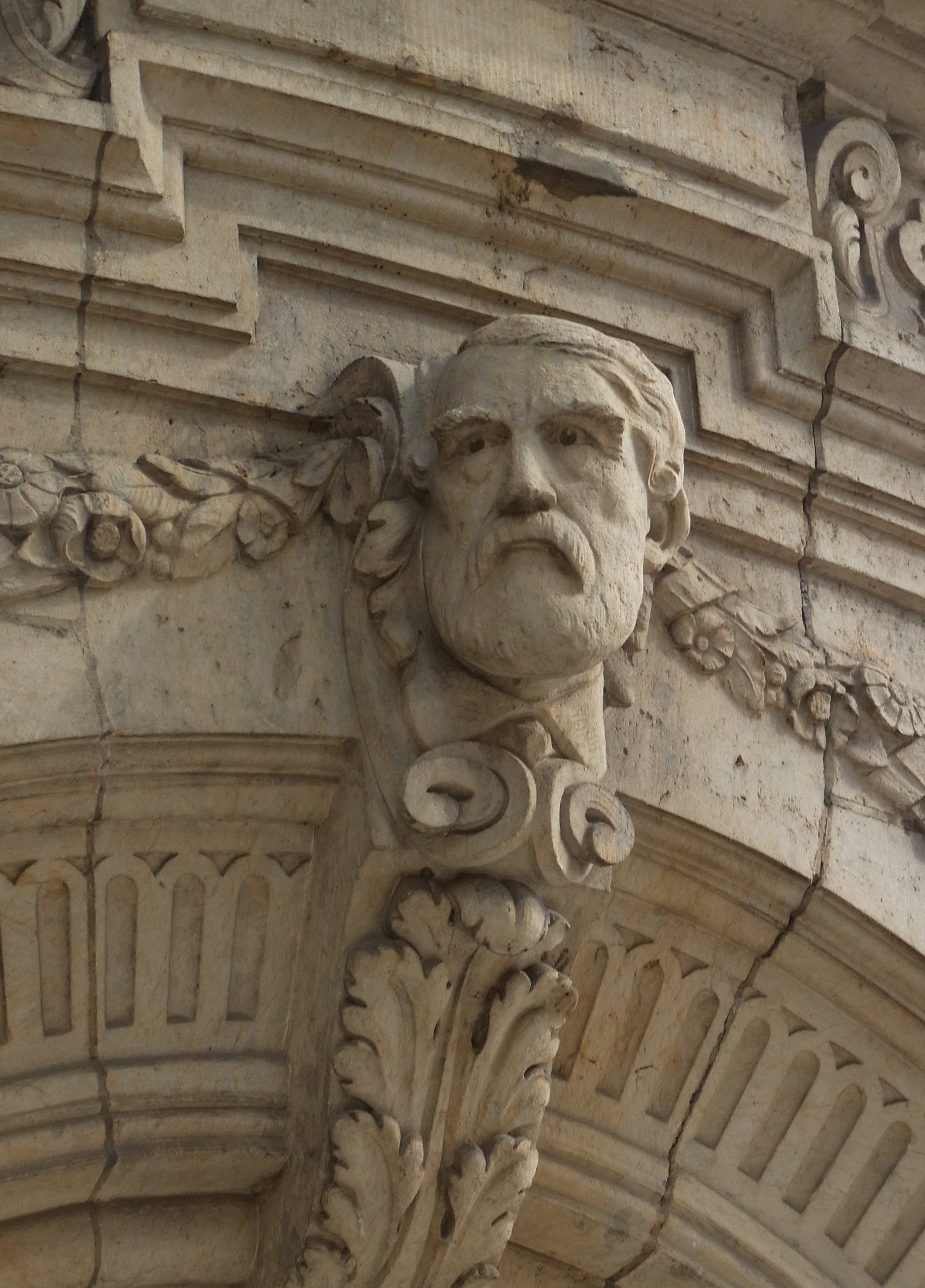 Porträt von Georg Hulbe an seinem 1910 gebauten Haus in der Mönckebergstraße - Seiteneingang